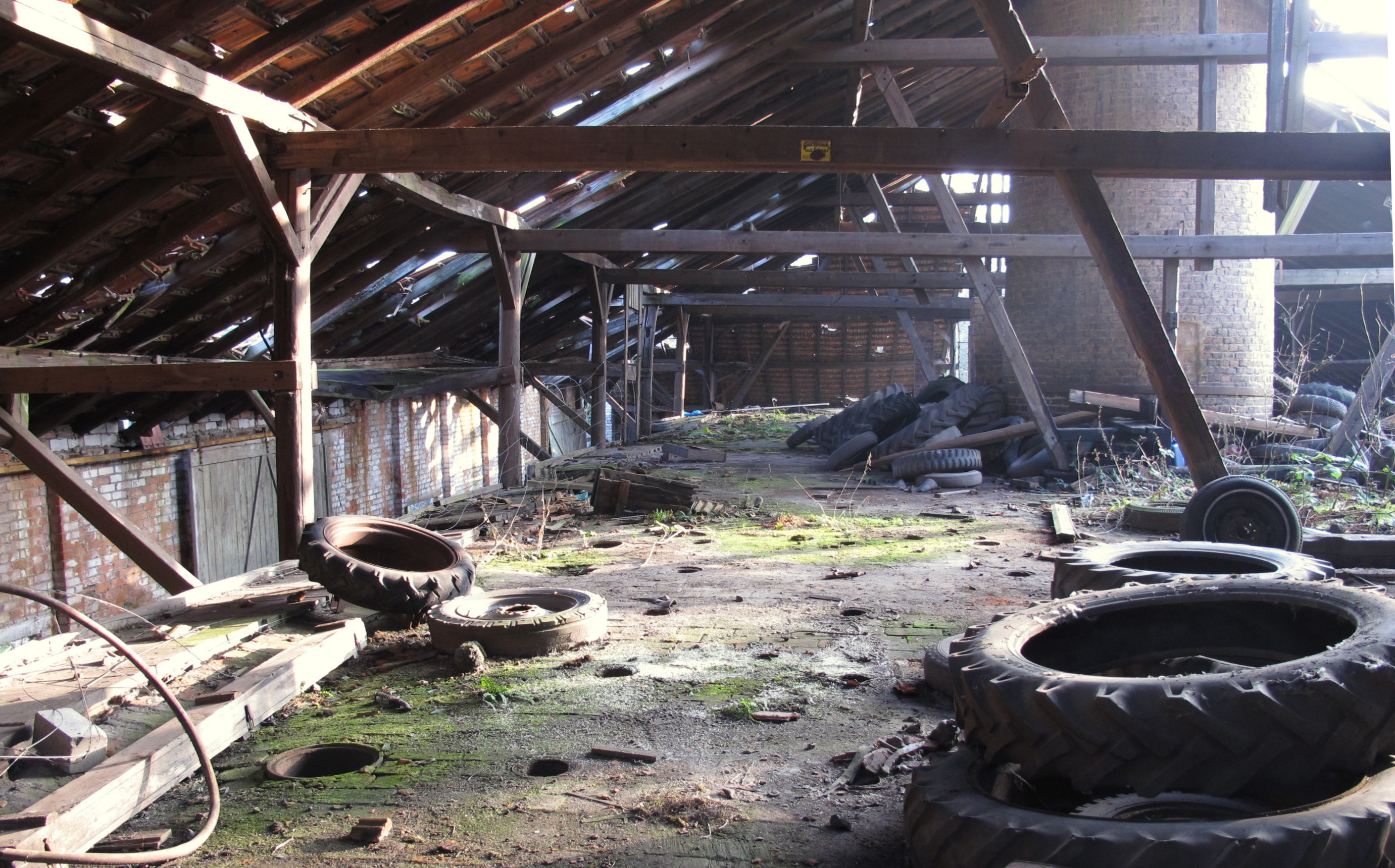 Im Ofengebäude der Alten Ziegelei in Wiesbaden-Bierstadt